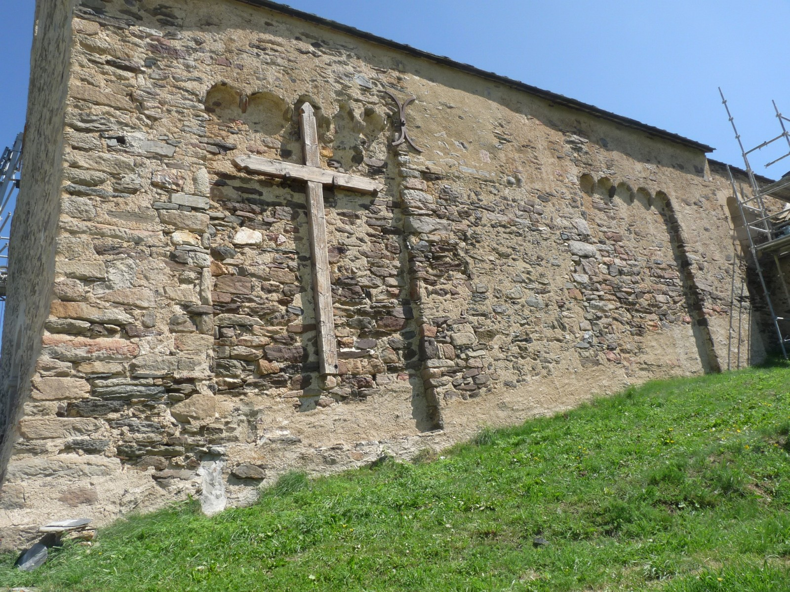 Eglise de Réal, Pyrénées-Orientales, France